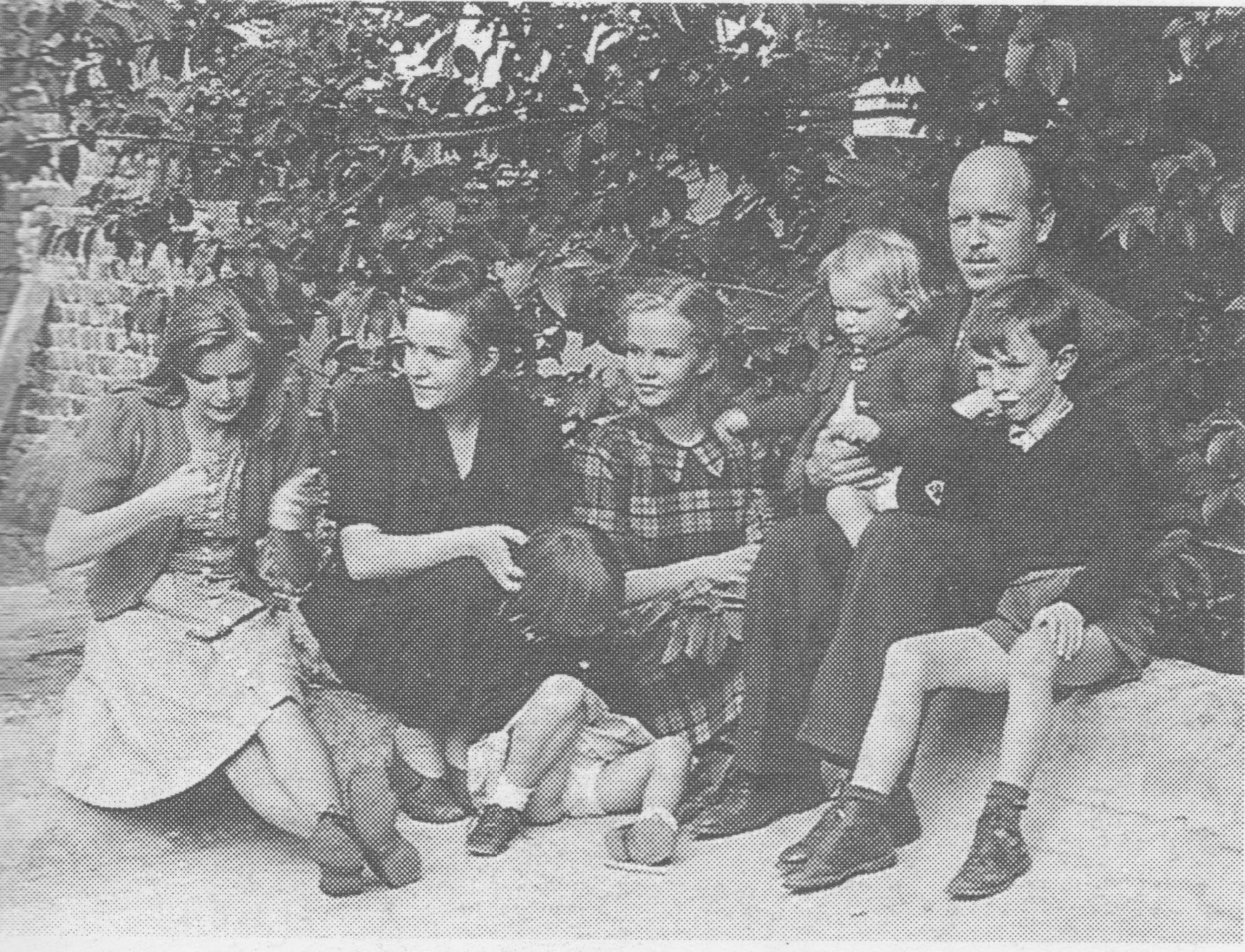 Manuela Ballester con su marido Josep Renau, sus hermanas Rosa y Fina, y sus tres hijos mayores en México, 1941